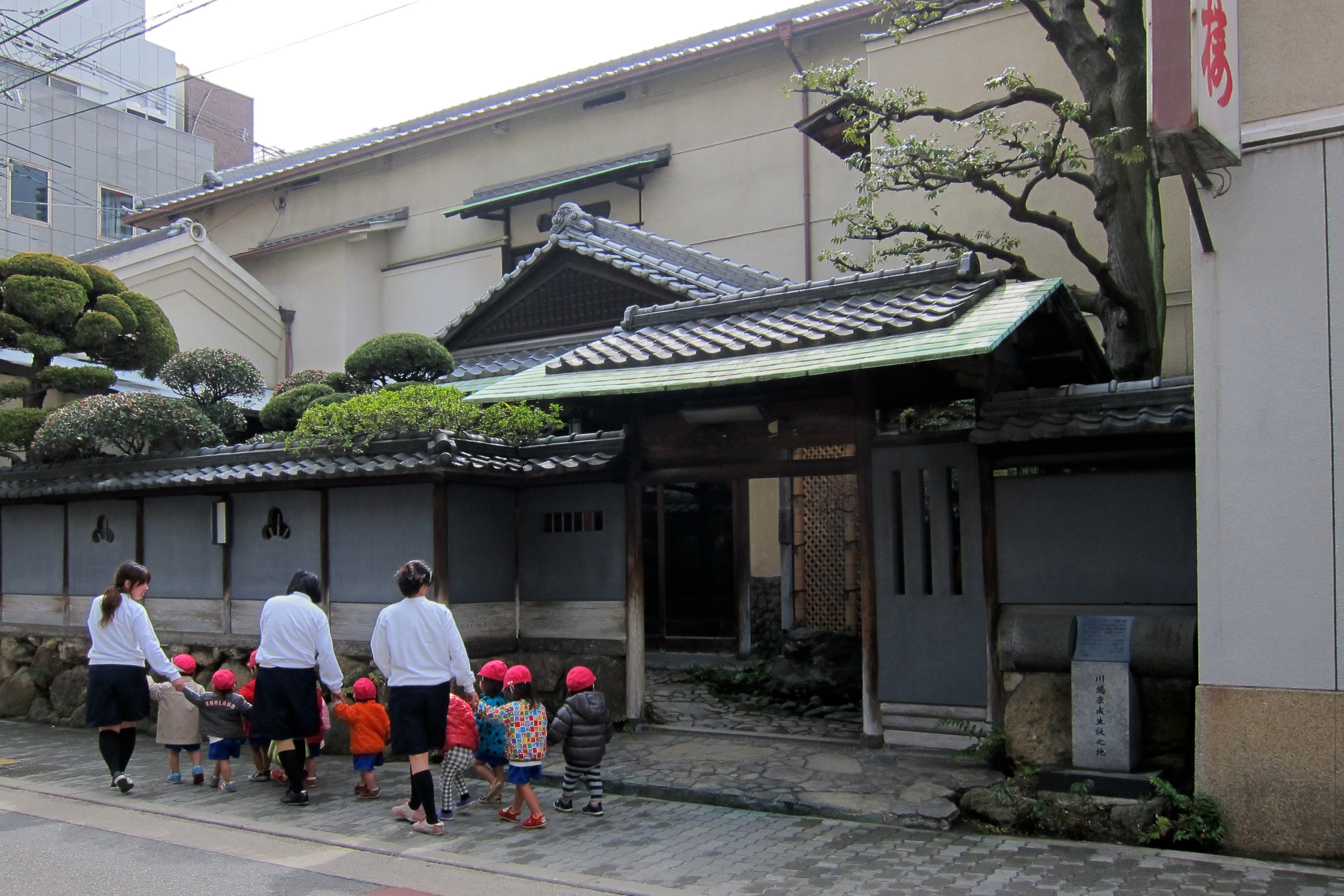 Yasunari Kawabata's Birthplace (川端康成生誕地) at Osaka City, Japan.